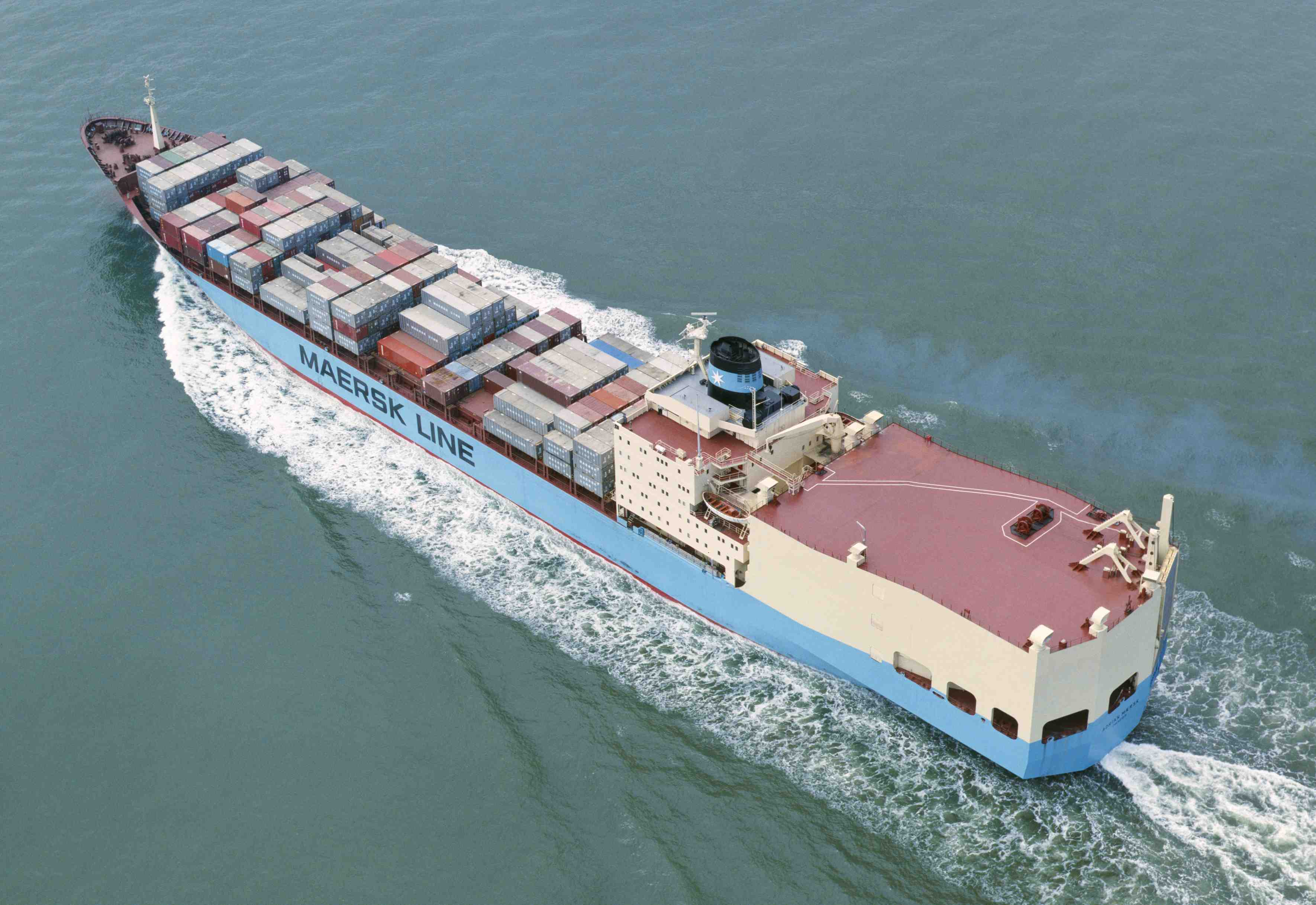 Adrian Mærsk (1975)